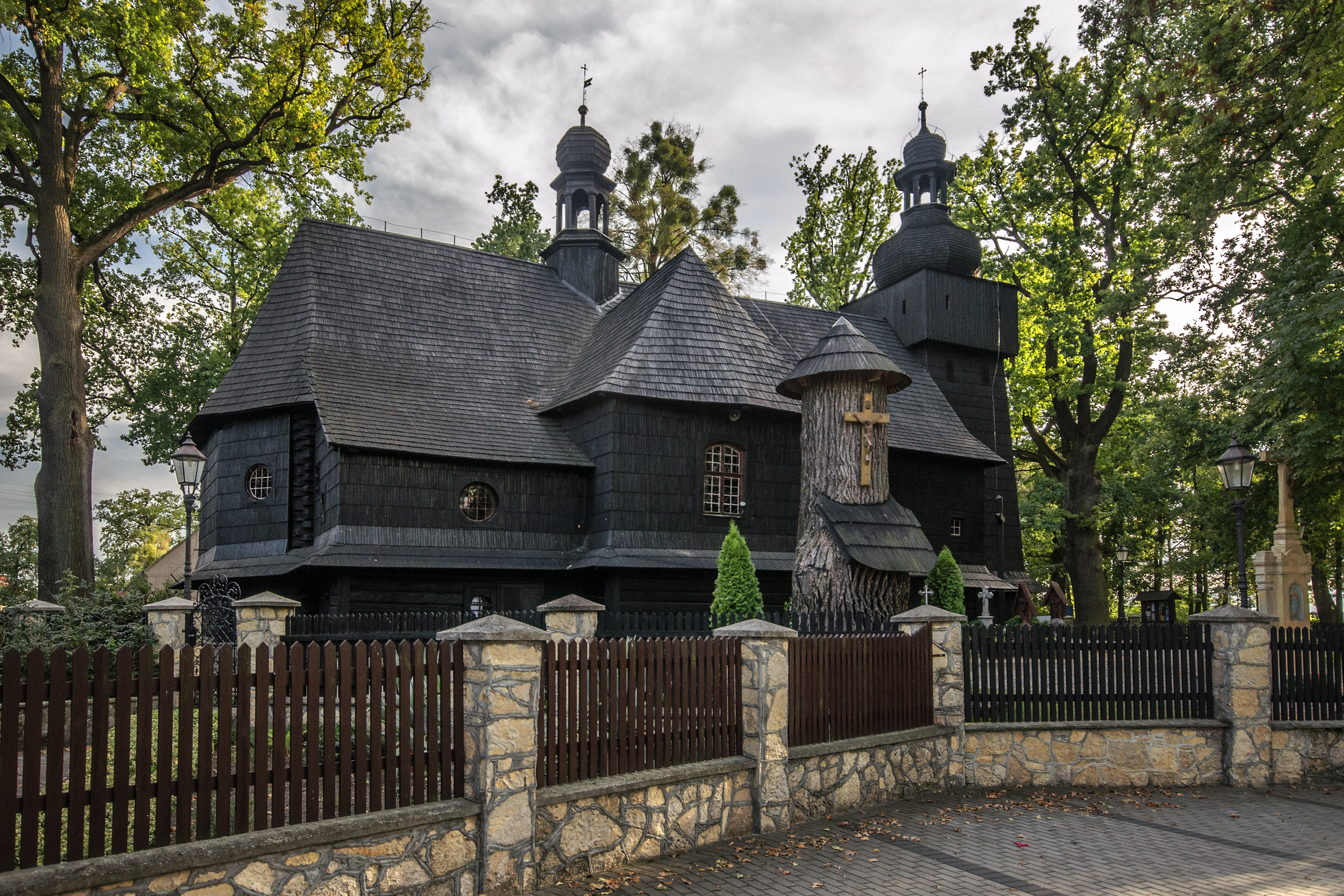 Bierdzany, kościół par. p.w. św. Jadwigi, 1711